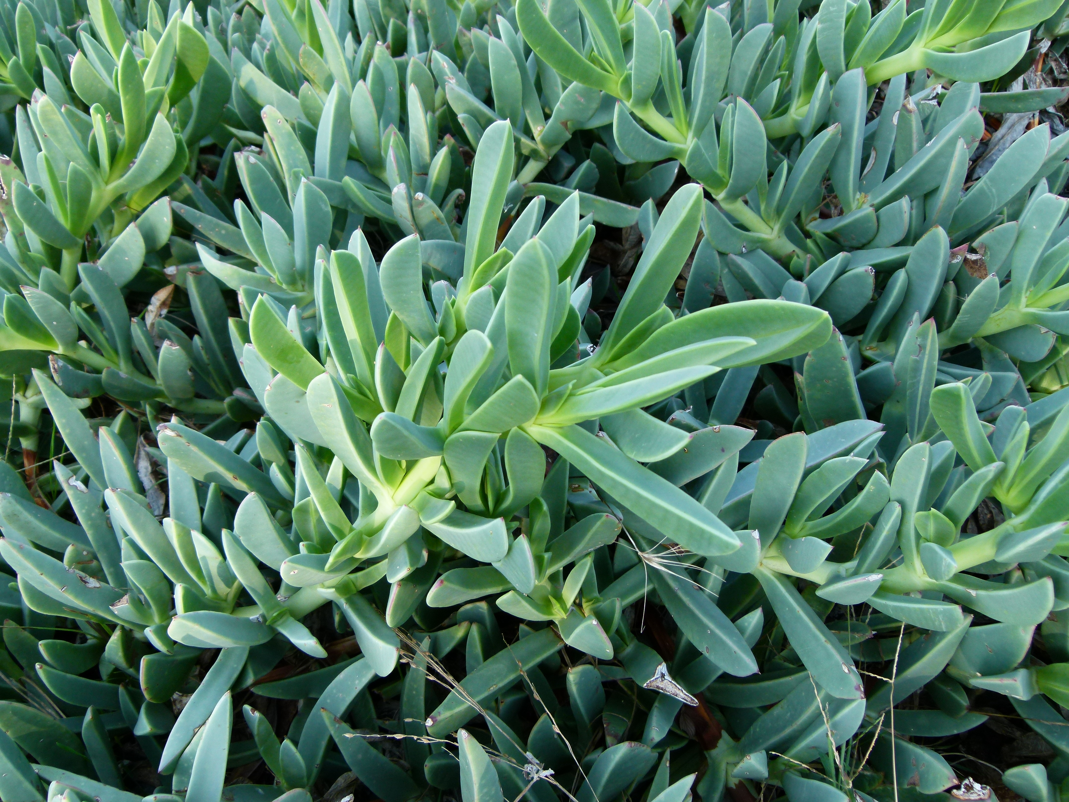 Jardin botanique Barcelone